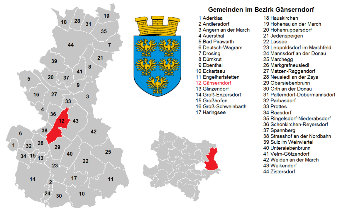 Bezirk Baden